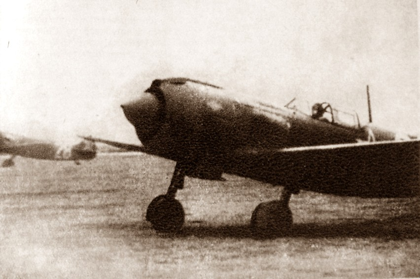 radzieckie myśliwce